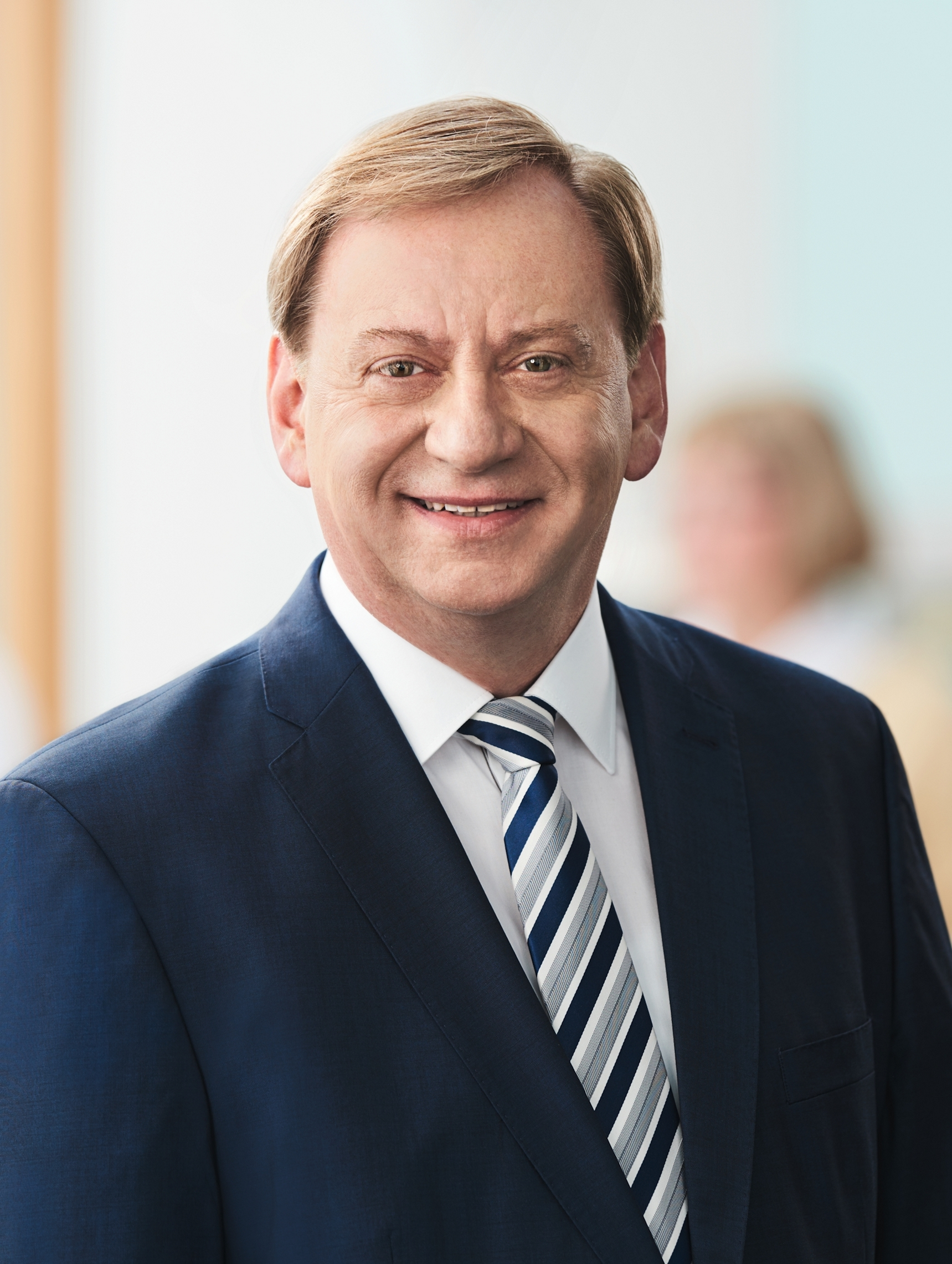 Bundestagsabgeordneter Ingo Gädechens (CDU)